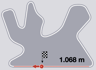 Circuito Internacional de Losail